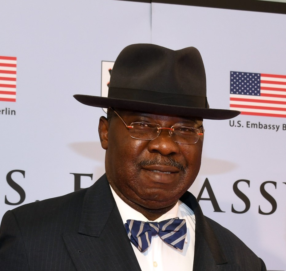 Jean Marie Maguena, Botschafter aus Gabunin Deutschland beim Empfang in der US-Botschaft in Berlin 4th of July 2018